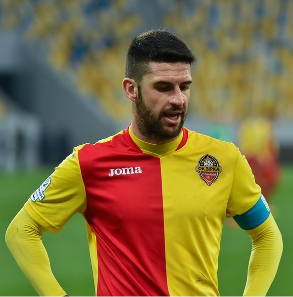 Федерико Эрнан Перейра - аргентинский футболист